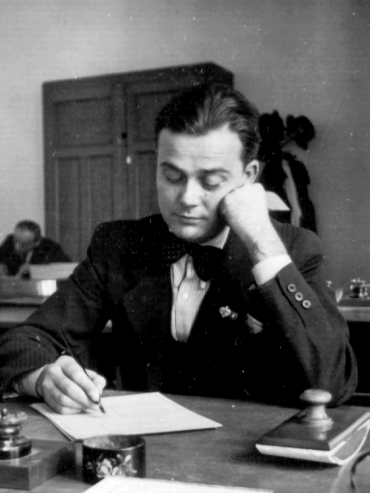 Weygand Tibor (Alcsút, 1905. november 27. – Budapest, 1965. július 12.) dalénekes, az 1930-40-es évek egyik legnépszerűbb előadója, számos egykori slágert elénekelt, az egyik első magyar hangosfilm-zeneszerző és énekes.